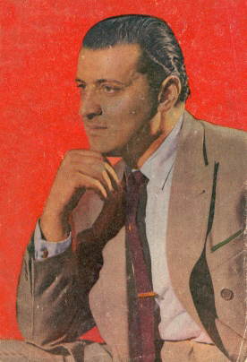 Fotografía del cantante de tangos de Uruguay Julio Sosa, extraída de la portada del libro "Dos horas antes del alba" (editorial Logos, Buenos Aires, Argentina. 1960).